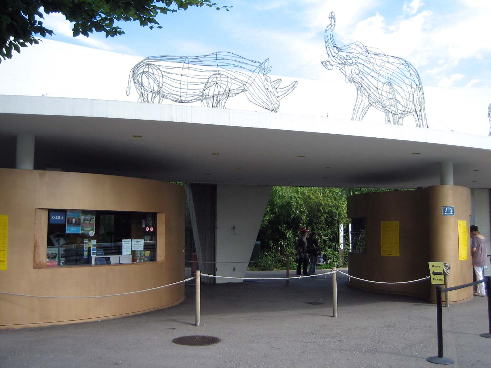 Alter Eingang zum Zürcher Zoo vor dem Umbau im Jahr 2013, Architekt Jean-Pierre Dürig